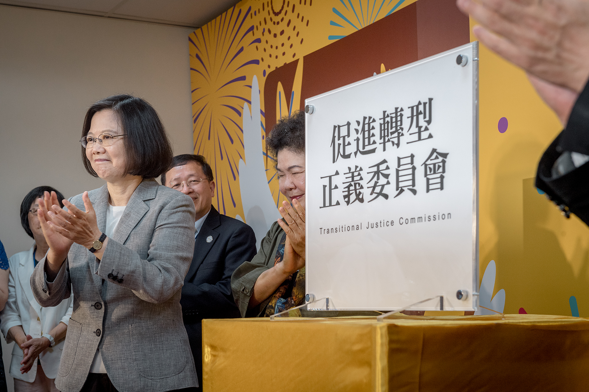 Transitional Justice Commission